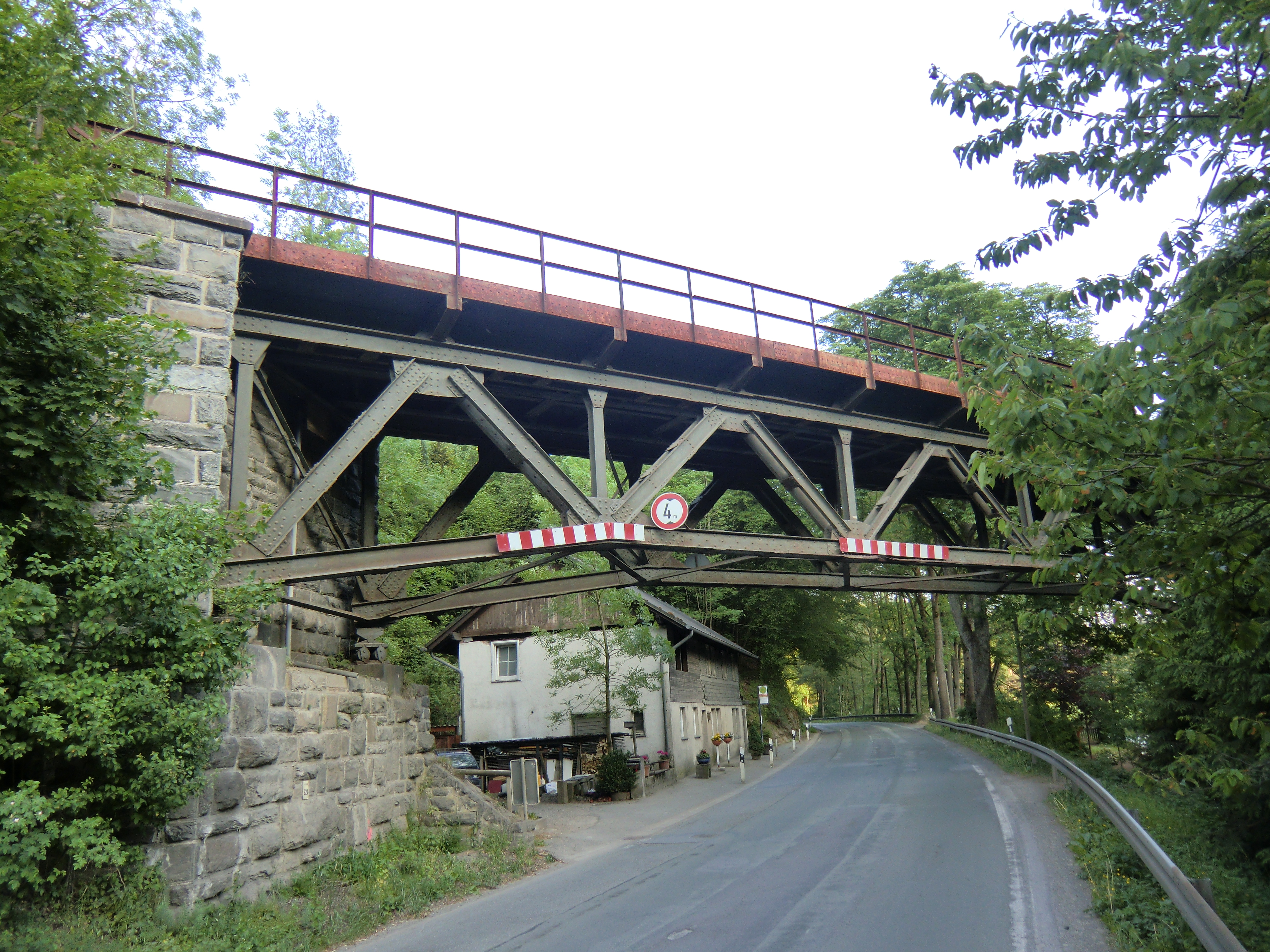 Nebenbahn Wenholthausen–Finnentrop. Das Wenne-Viadukt. Links führt die Strecke nach Wenholthausen, rechts nach Finnentrop.